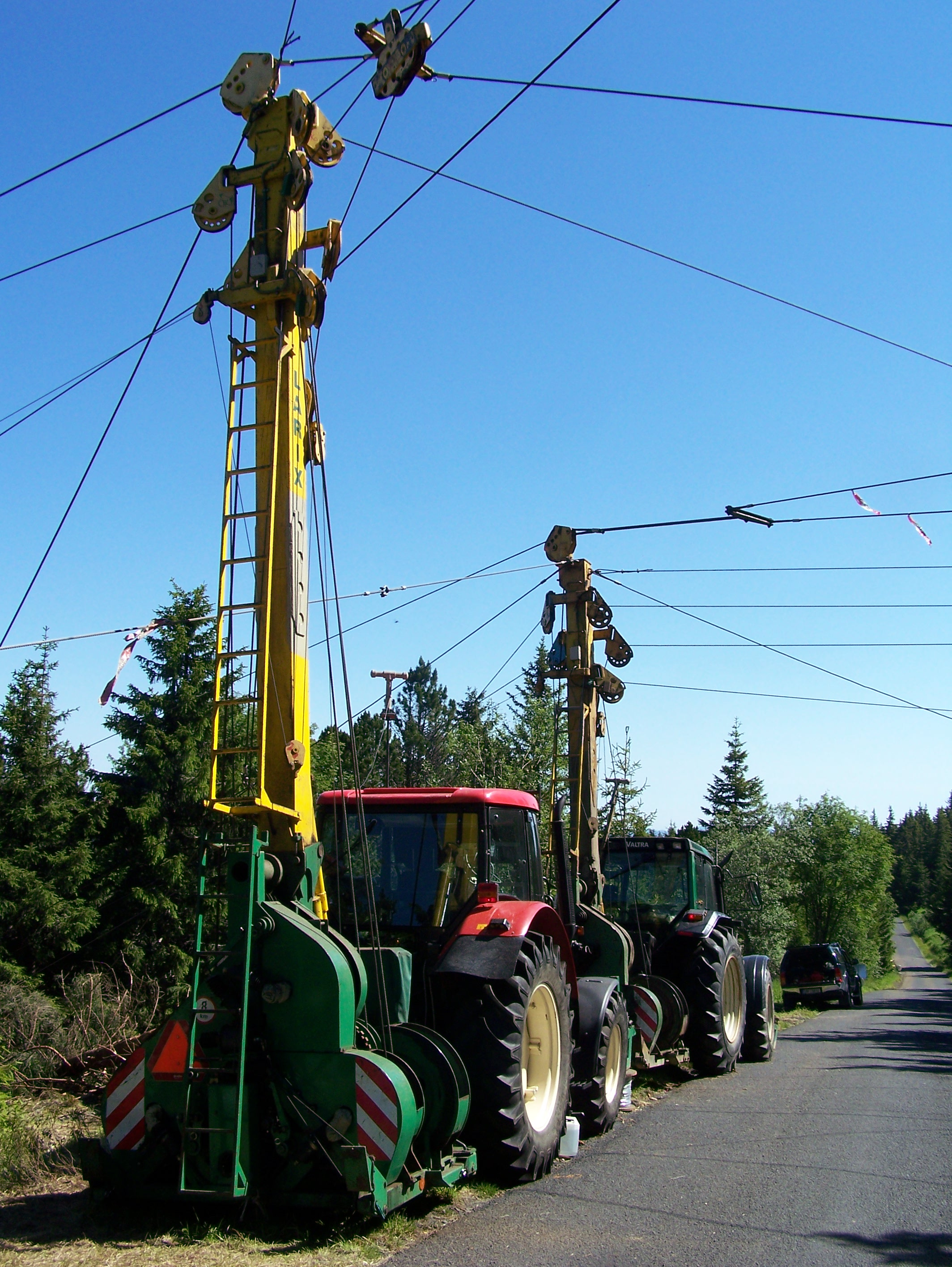 Travaux de restauration des zones humides grâce au câble mât, Mont Mézenc, France